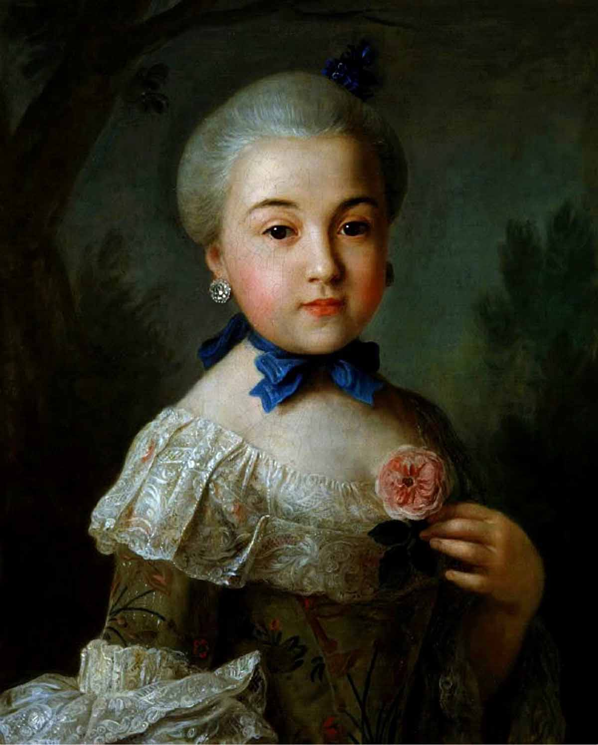 Шереметева Варвара Петровна (графиня, 1760) в замуж. Разумовская Государственный Русский музей.